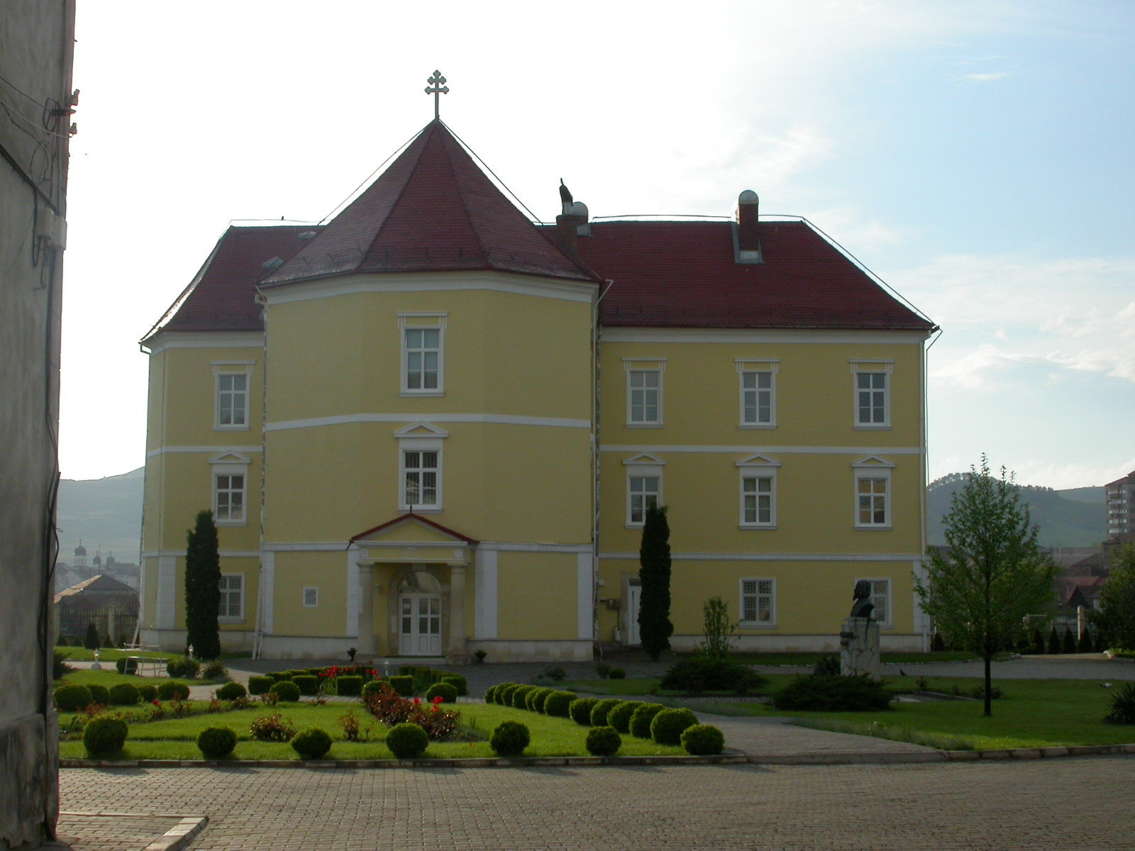 Reședința mitropolitană, 1535, transf. 1837 01